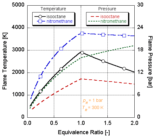 Nitrometano contra isooctano. Temperatura de la flama y presión.